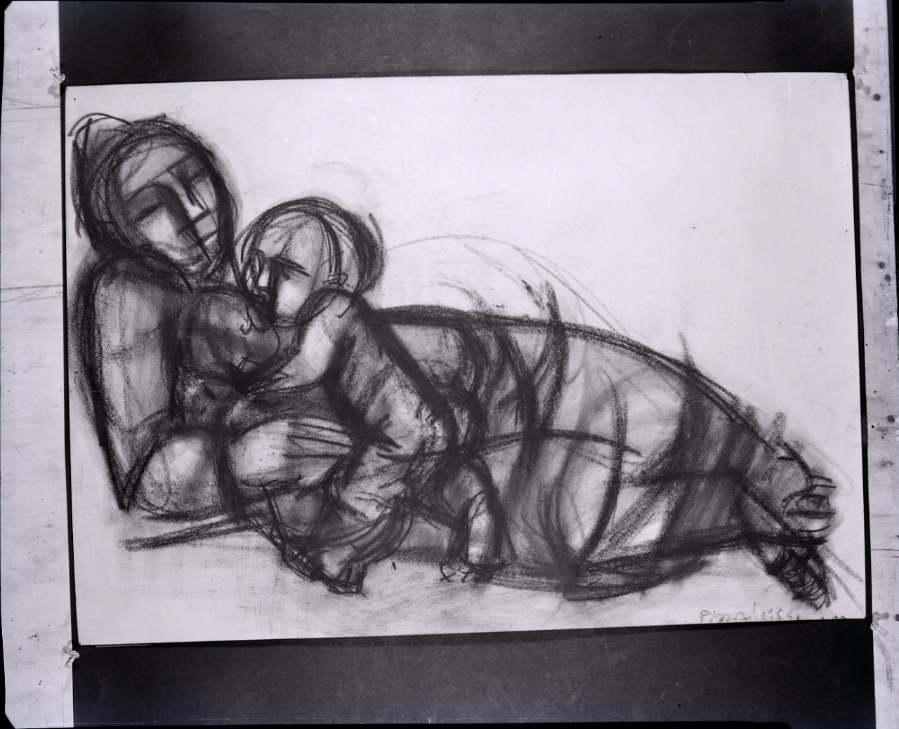 Servizio fotografico : Italia, 1975 / Paolo Monti. - Buste: 4, Fototipi: 4 : Negativo b/n, gelatina bromuro d'argento/ pellicola ; 10x12. - ((Serie costituita da 4 negativi identificati con i nn.: 20342-20345. Numerazione parallela: 160-163. La suddetta serie è contenuta nella scatola identificata con la numerazione 20336-20373. Sulla scatola manoscritto con pennarello nero: "Arch. Pellini". La scatola è a sua volta contenuta in una scatola grande col coperchio giallo. - Fonte: Rubrica di Paolo Monti: s.t. [Soggetti e committenti] (1956-1961), presso Archivio Paolo Monti